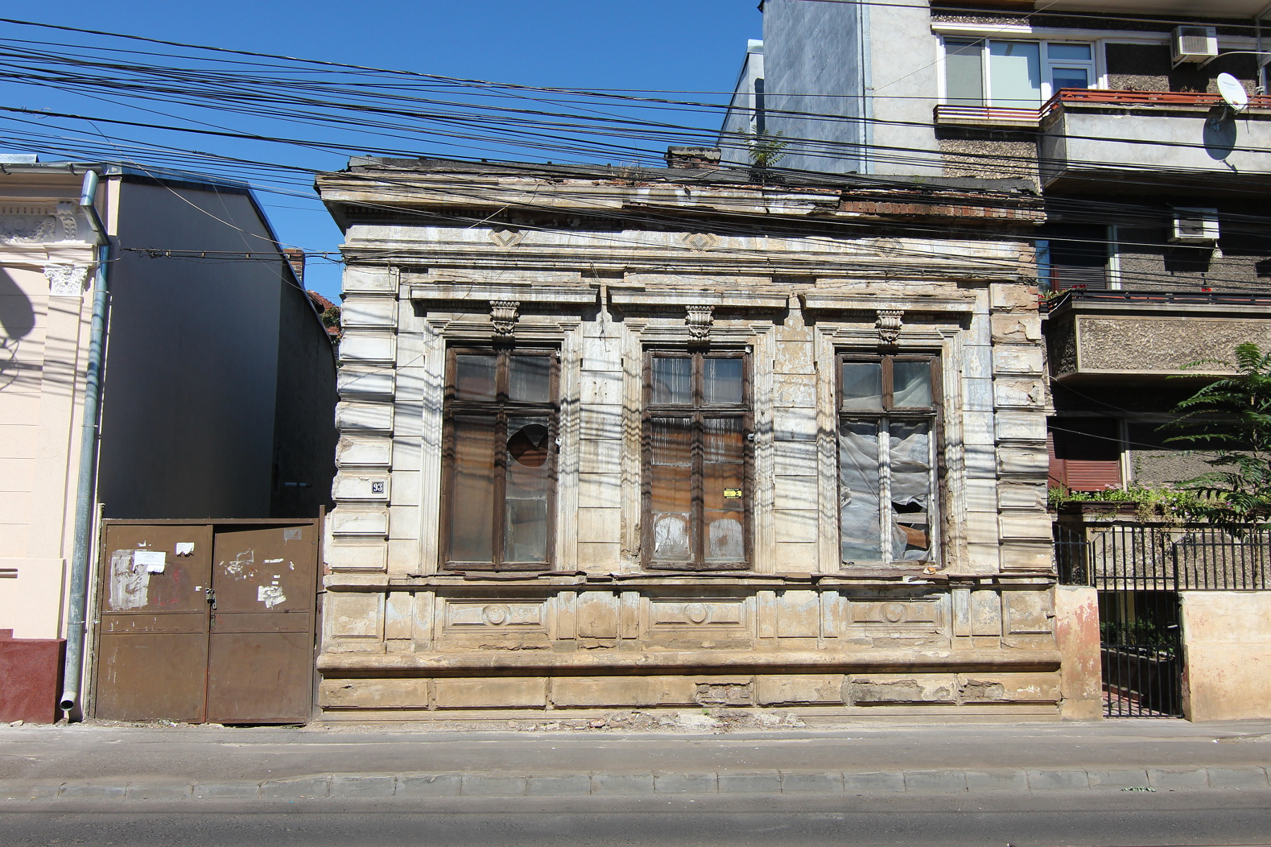 Casă pe Calea Călărașilor